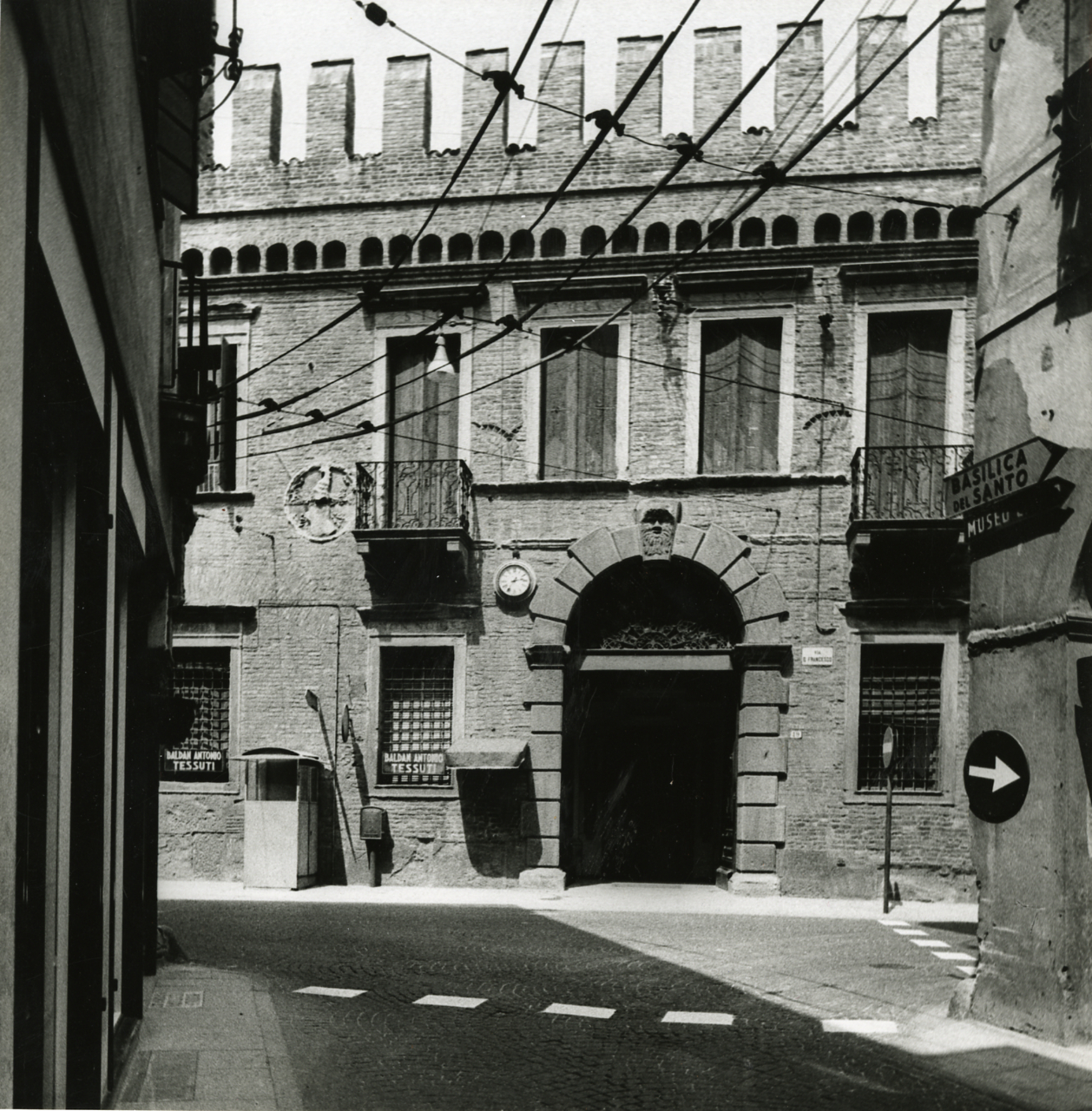 Servizio fotografico : Padova, 1967 / Paolo Monti. - Stampe: 2 : Positivo b/n, gelatina bromuro d'argento/ carta, 24x30. - ((Al verso delle stampe iscrizioni didascaliche manoscritte a matita; timbro a inchiostro con copyright: "© - Credit to:/ Paolo Monti/ Via T. Tasso [...]/ Milano [...]". - Sul coperchio della scatola iscrizione didascalica manoscritta a pennarello nero: "Emilia/ Ferrara, Padova". - Occasione: Documentazione per la pubblicazione: Diego Valeri (a cura di), "Padova: i secoli, le ore", Bologna, Edizioni Alfa, 1967. - Fonte: Monografia di Valeri Diego (a cura di): Padova: i secoli, le ore, Bologna, Edizioni Alfa (1967). - Fonte: Agenda di Paolo Monti: Monti/ 3 aprile 1966 - 9 marzo 1971/ 12421-16823 (1966-1971), presso Archivio Paolo Monti